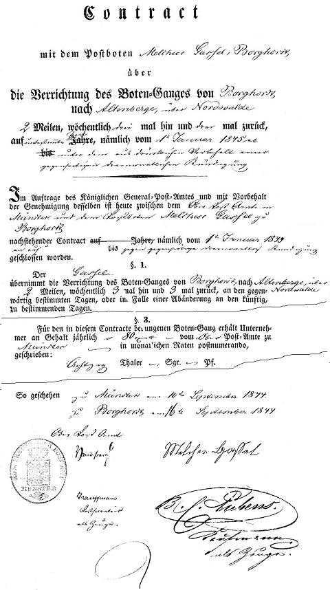 Ein preußischer Contrakt zwischen dem Postboten Melchior Gassel in Borghorst im Auftrag des Königlichen General-Posta-Amtes, Münster den 10. September 1844